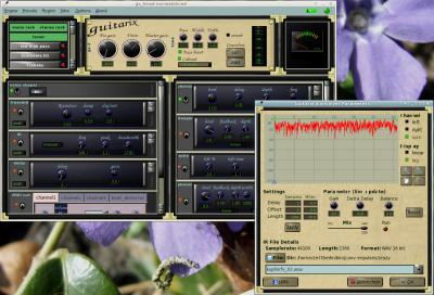 Screenshot der Gitarrenverstärker-Software Guitarix